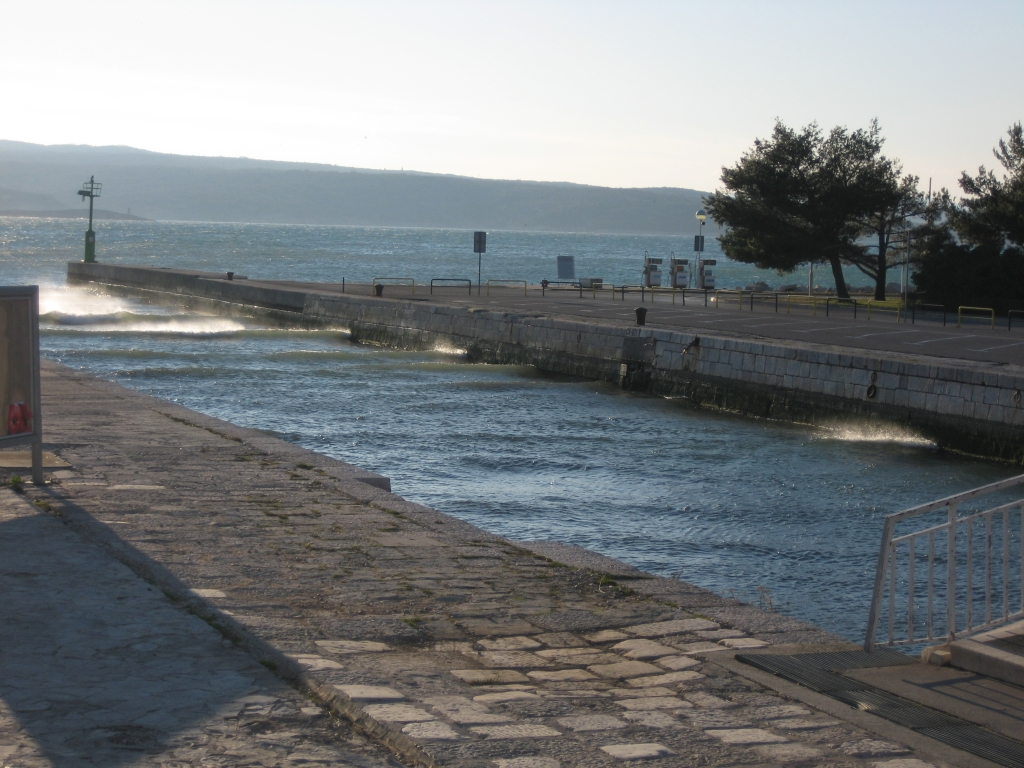 Ušće Dubračine, Crikvenica